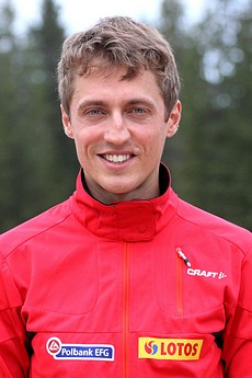 Tomasz Pochwała, autor: Alicja Kosman